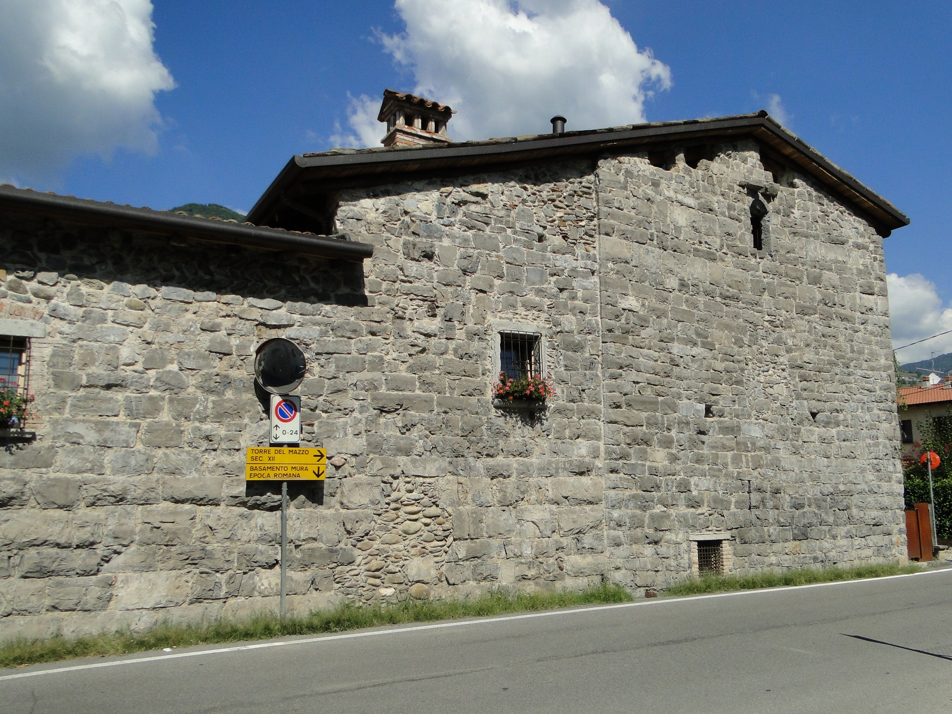 Torre del Mazzo, Cene (BG), Italia